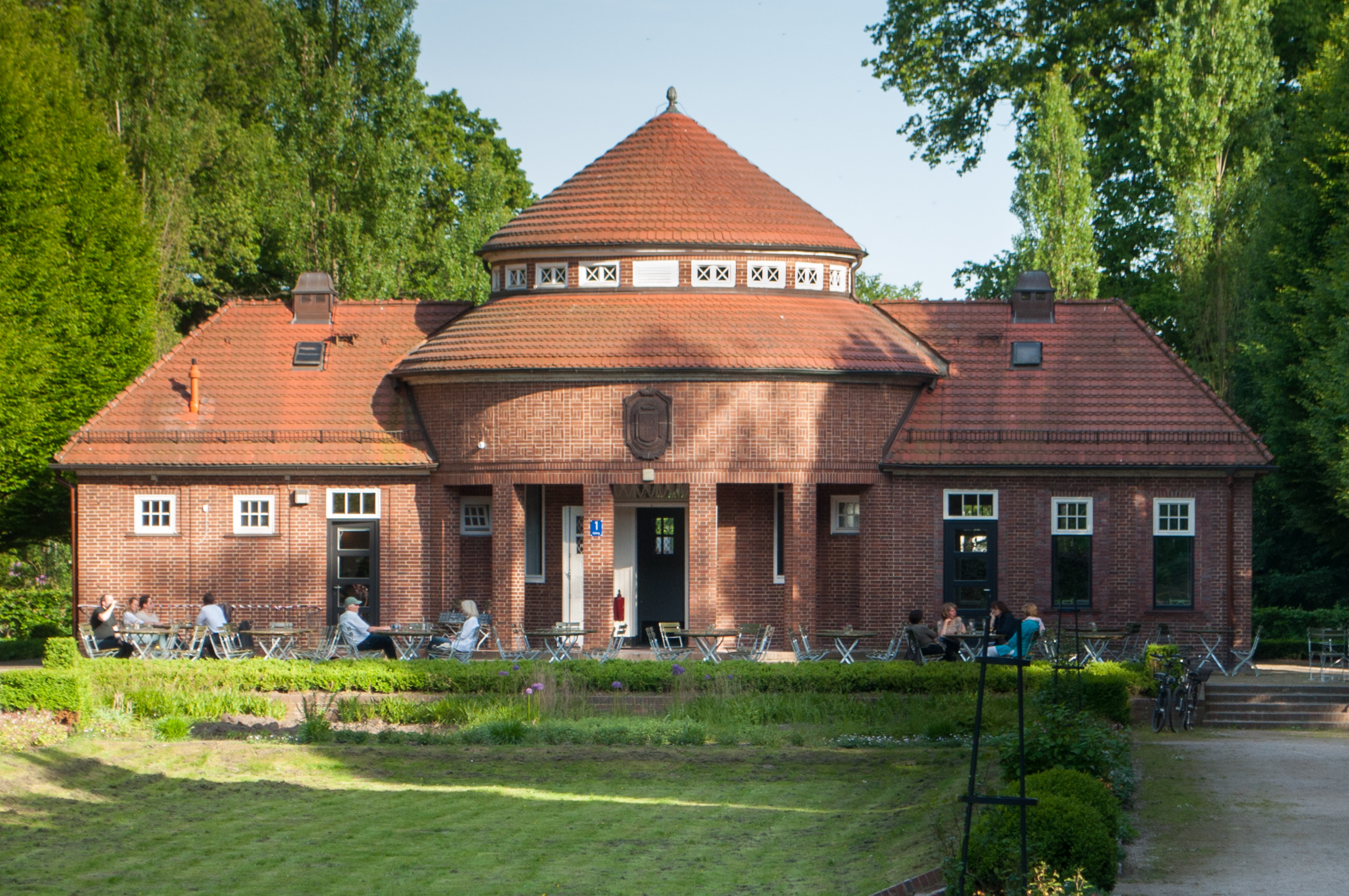 Gartenseite der Trinkhalle im Hamburger Stadtpark in Hamburg-Winterhude. This is a photograph of an architectural monument.